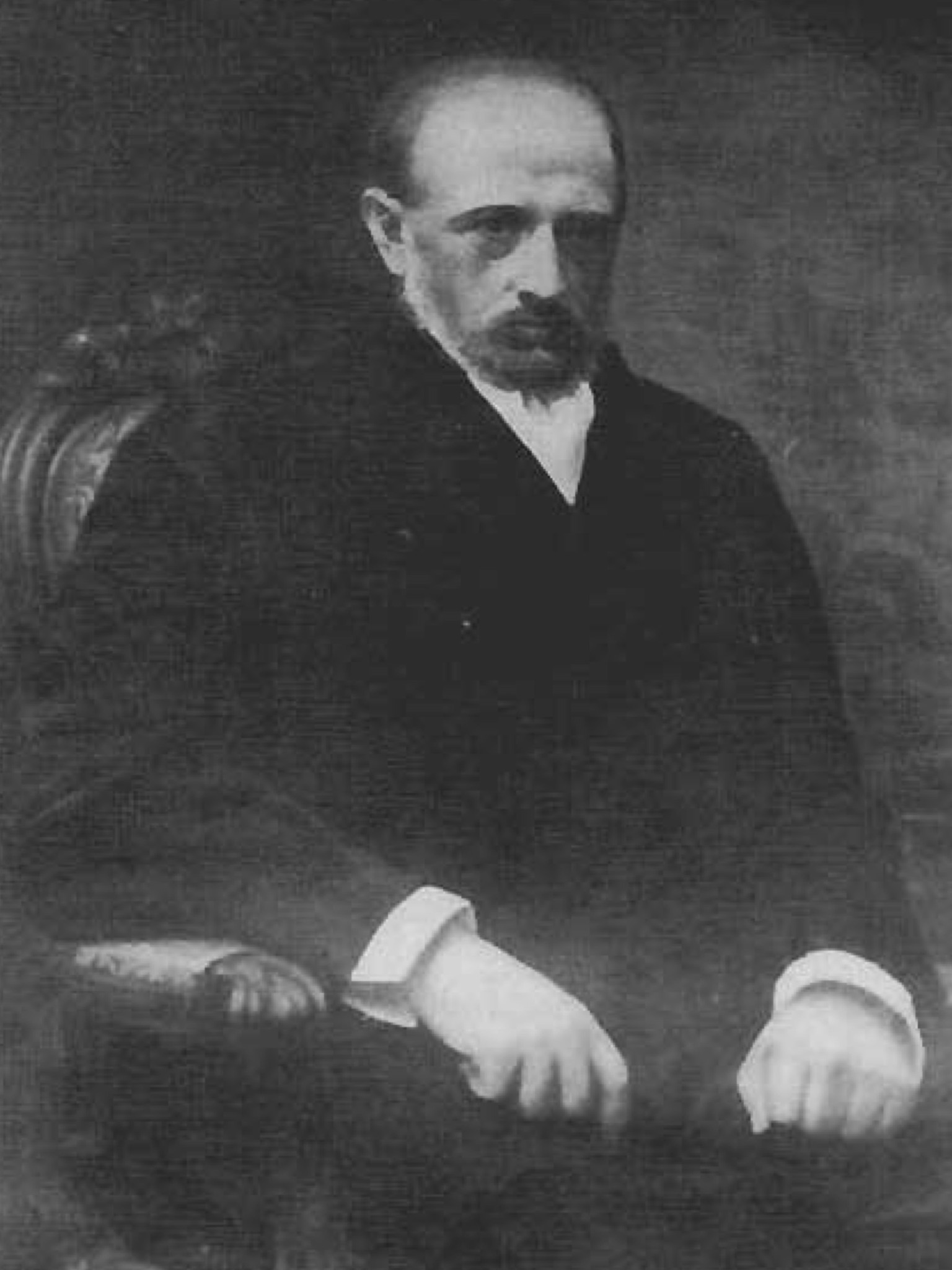 Fotografía del archivo nacional de la Universidad de Chile.